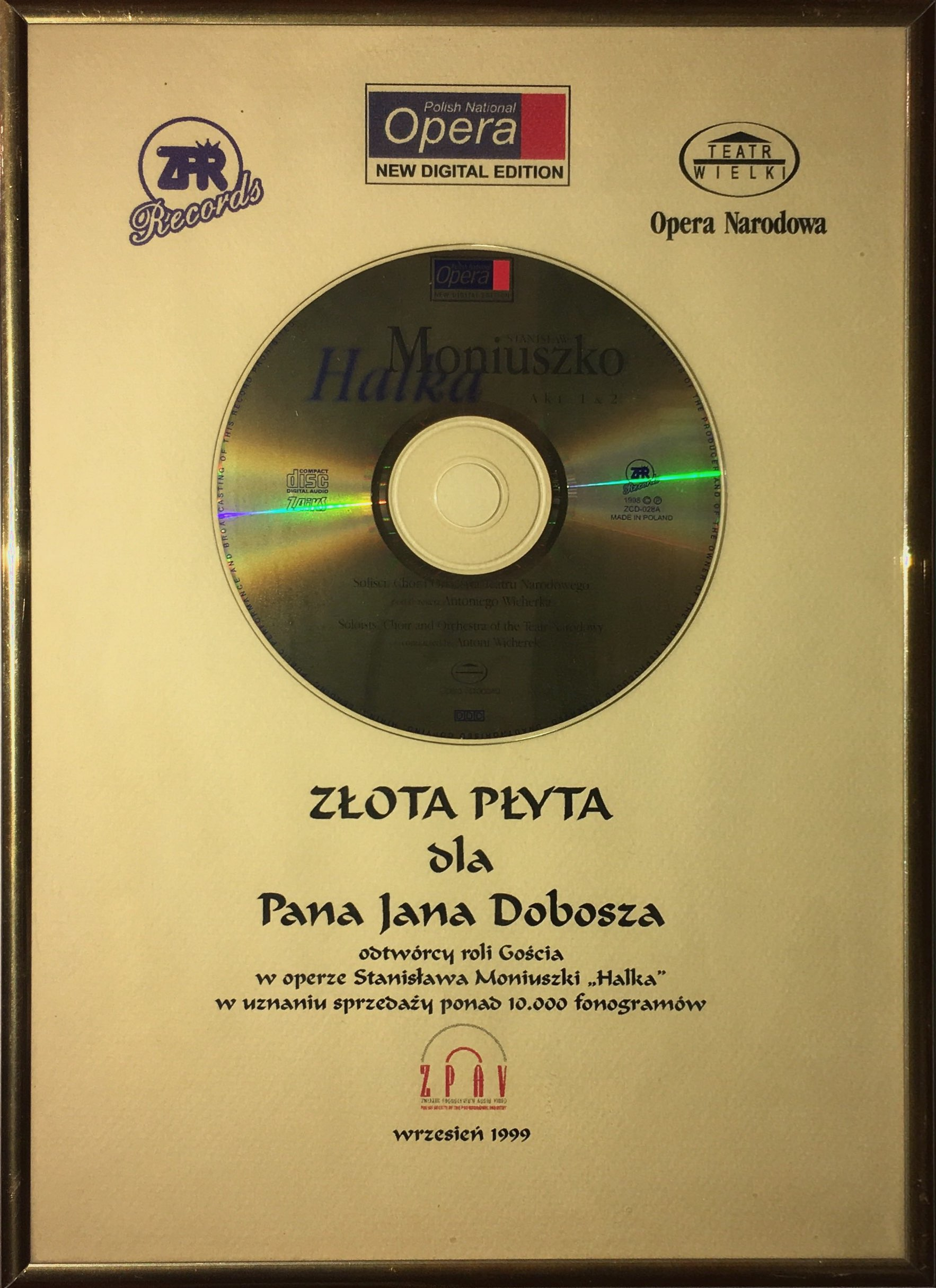 Złota Płyta, Halka, Stanisław Moniuszko